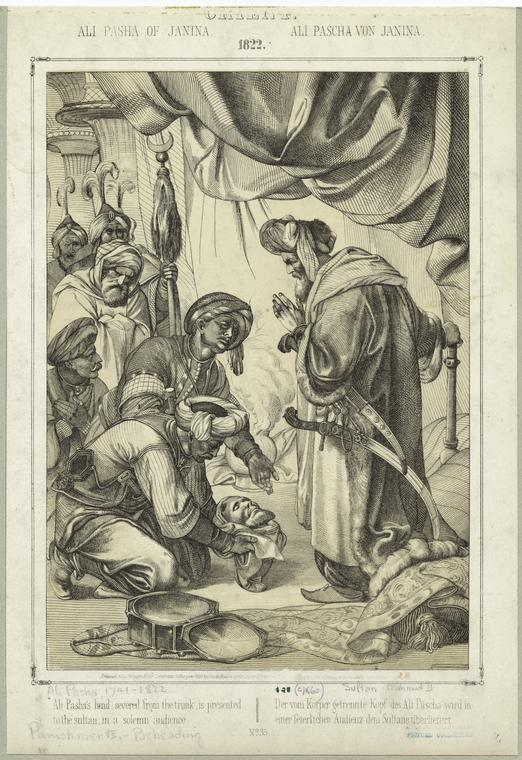 Ali Pasha's head, severed from the trunk, is presented to the Sultan Mahmud II, in a solemn audience Der vom Körper getrennte Kopf des Ali Pascha Tepelena wird in einer feierlichen Audienz dem Sultan Mahmud II überliefert.